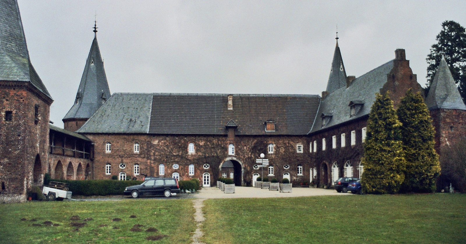 Innere Vorburg des Schloss Haag in Geldern